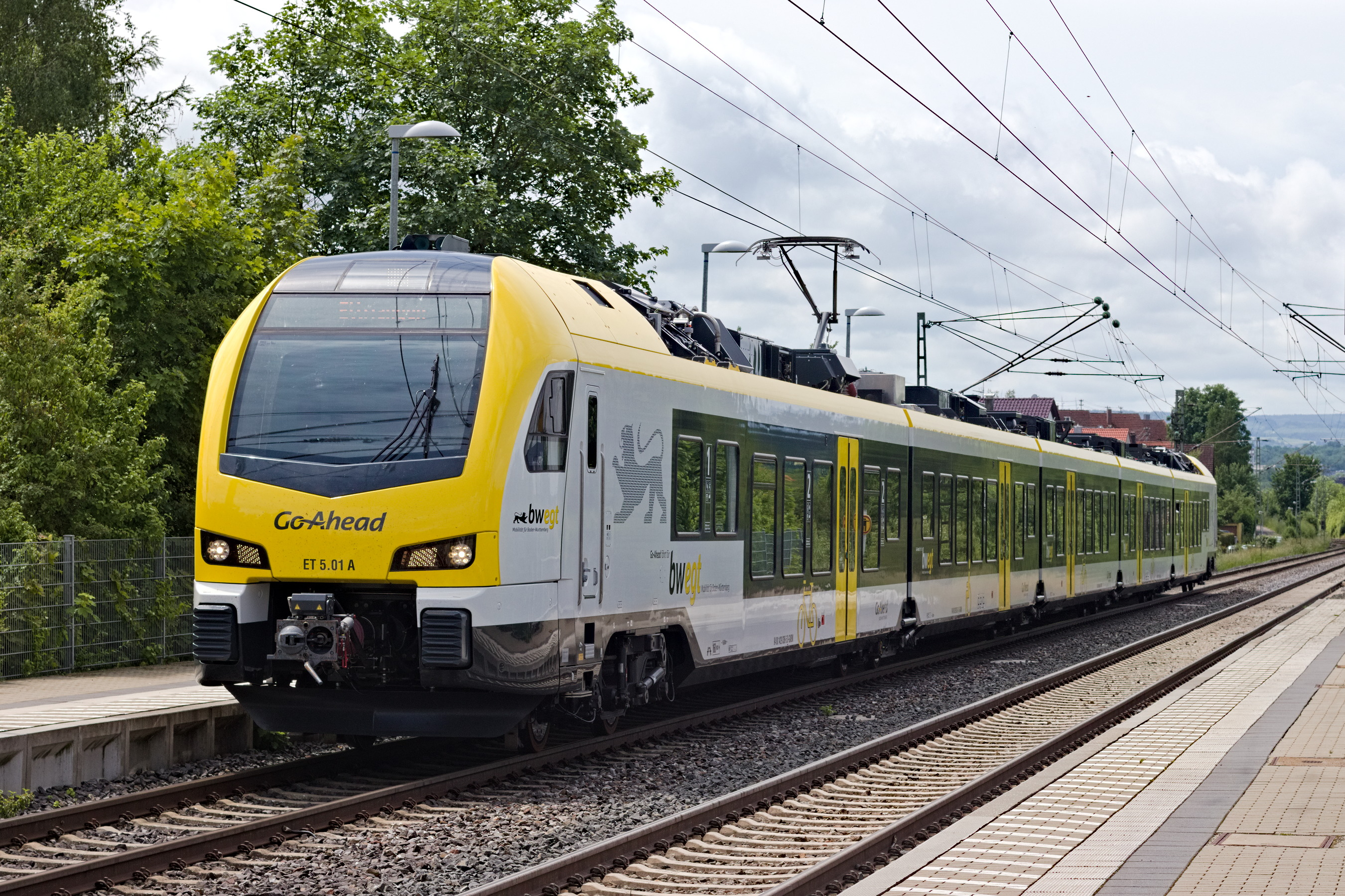 Go-Ahead ET 5.01 (1429 036/536) fährt in Hofen (bei Aalen) ein.